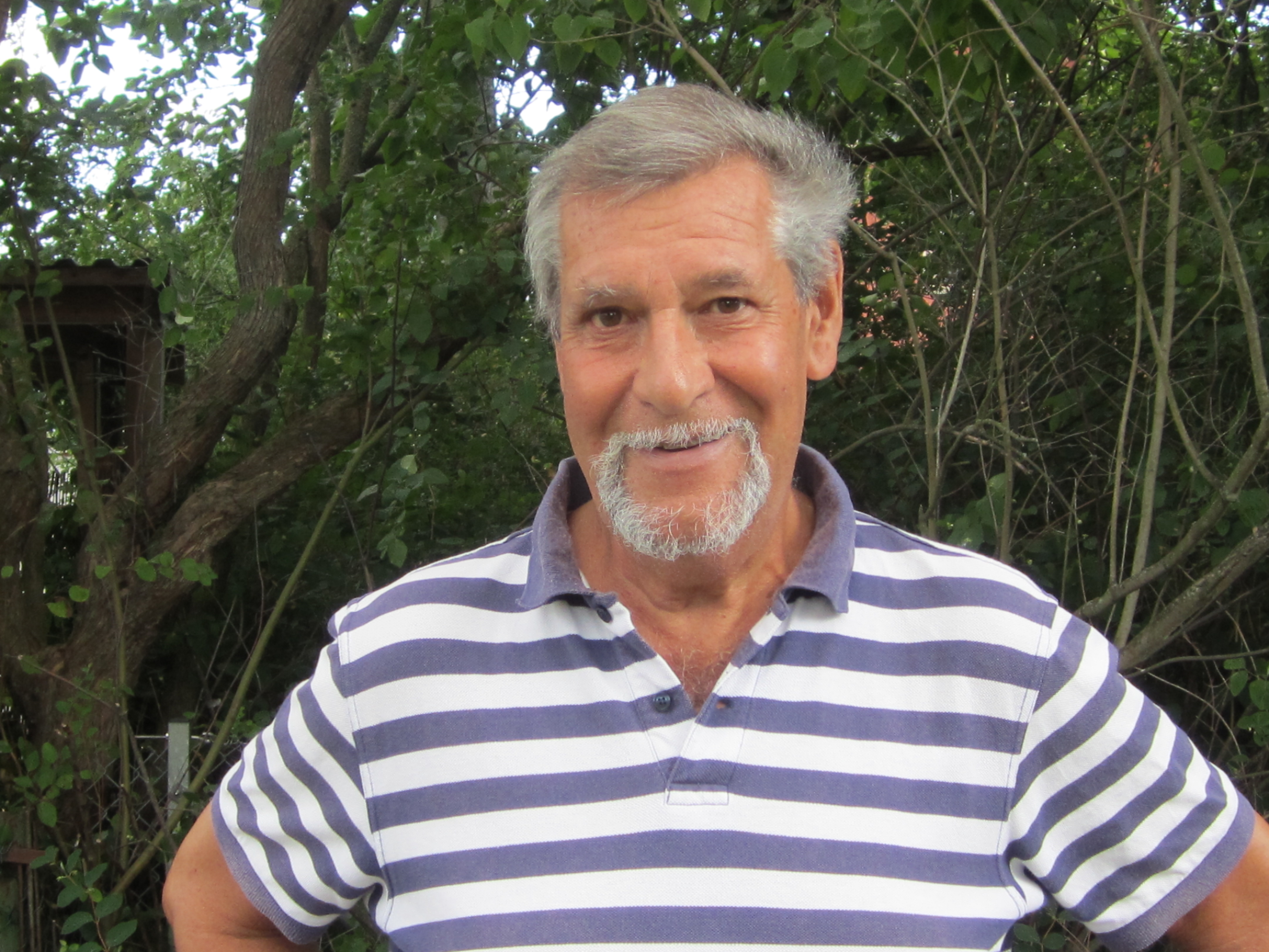 Jan Mårtenson augusti 2013